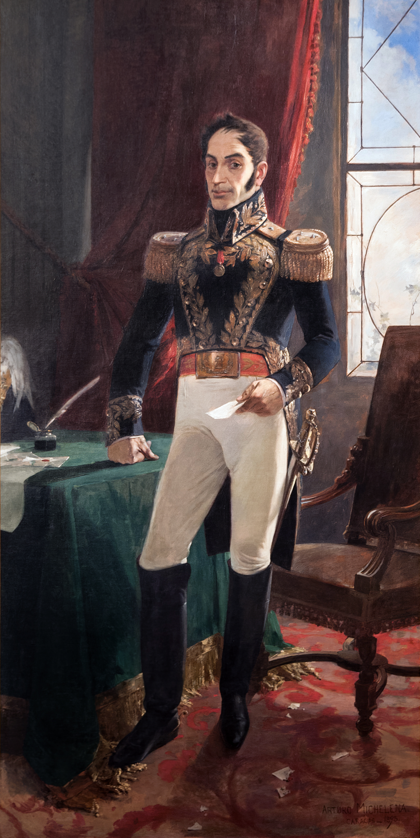 El Libertador en traje de campaña. 1895. Oleo sobre tela. 240 x 126,5 cm. Asamblea Legislativa del Estado Anzoategui. 1895.